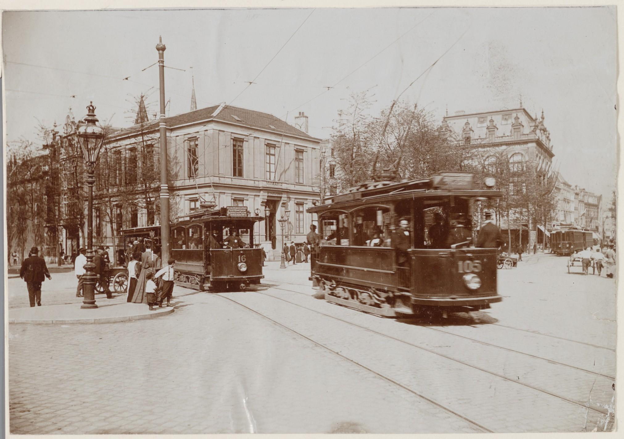 Beschrijving Tramlijn 2 tussen de Prins Hendrikkade en de Koninginneweg. Links: tramlijn 2 met motorwagen 16, Rechts: tramlijn 1 met motorwagen 105. Op de achtergrond Spui 12-10 enz. Gebouw "De Eengezindheid" , studentensoc. NIA. Achterzijde van de huizen voor het Begijnhof. De torenspits is van de Engelse kerk. Links: Nieuwezijds Voorburgwal. Documenttype foto Vervaardiger Boek-, kantoor- en papierhandel J. Vlieger Collectie Collectie Stadsarchief Amsterdam: foto-afdrukken Datering 1906 Geografische naam Begijnhof Spui Nieuwezijds Voorburgwal Inventarissen Afbeeldingsbestand OSIM00001005911 Generated with Dememorixer